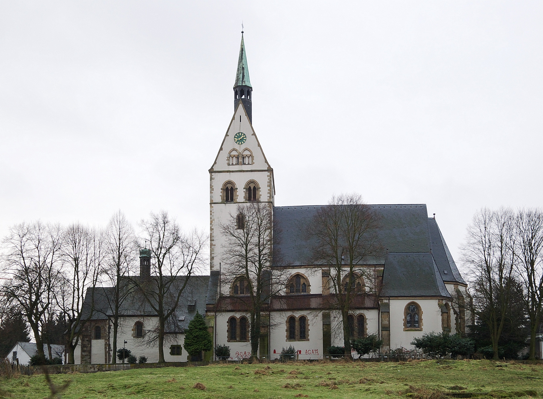 Katholische Kirche St. Josef (Dortmund-Kirchlinde)